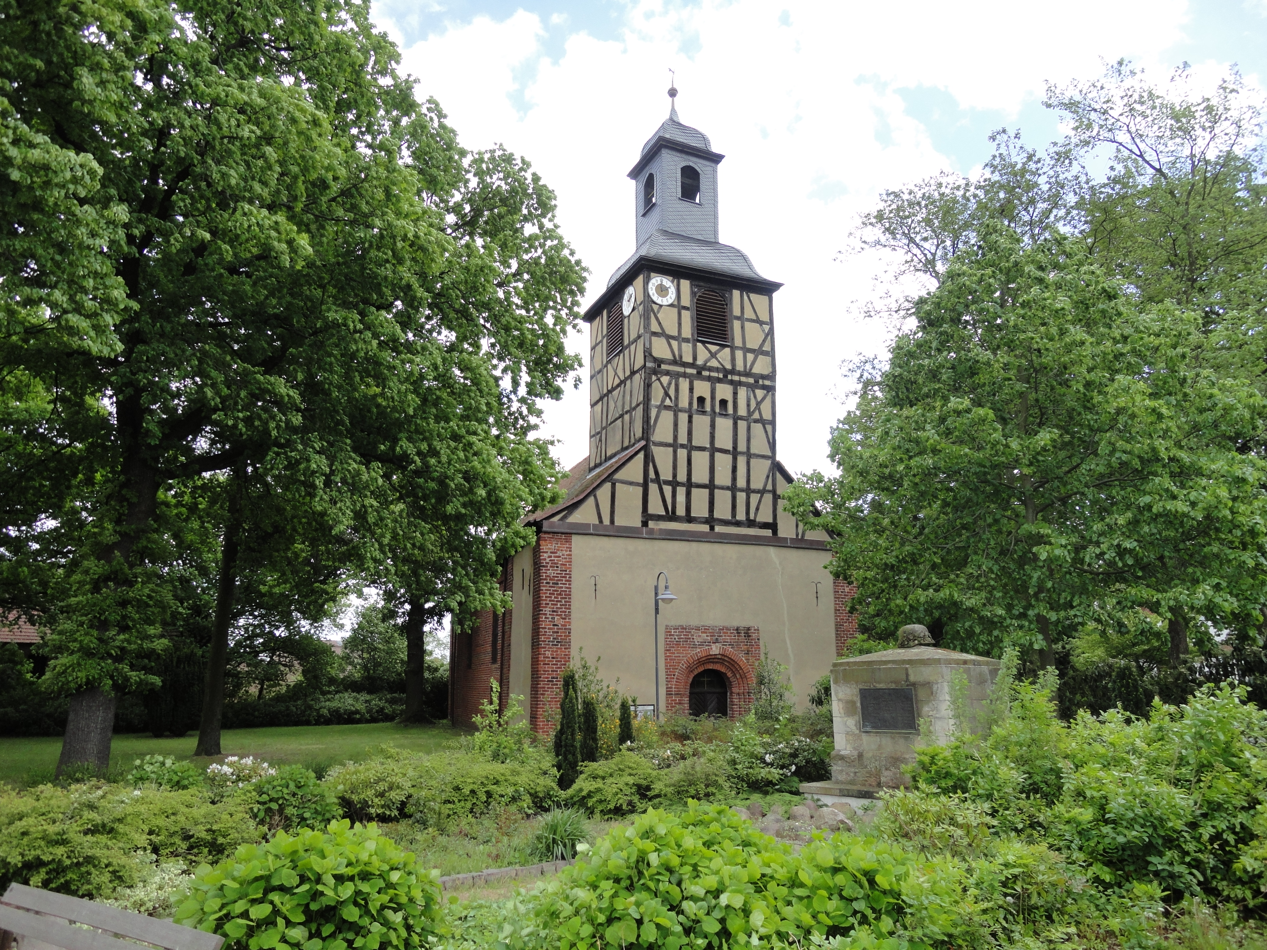 Dorfkirche Roßdorf, Ansicht von Westen (Straßenansicht)